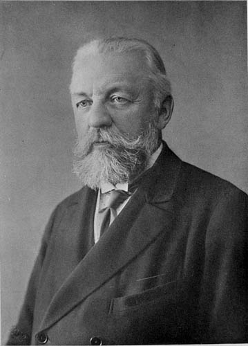 Оболенский Александр Дмитриевич (1855-1933)